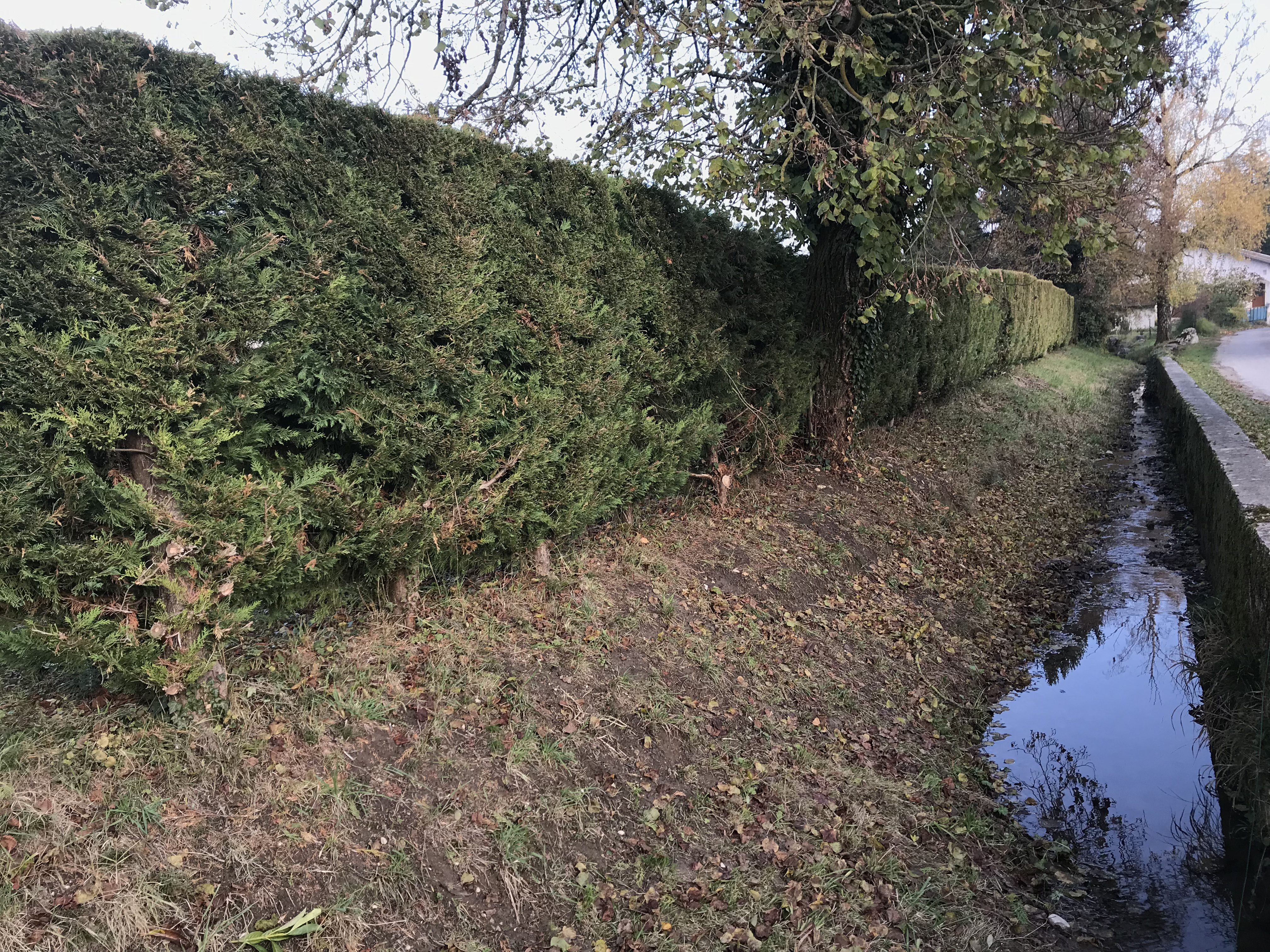 Le cours d'eau Gardon à Mollon (Villieu-Loyes-Mollon, Ain, France).